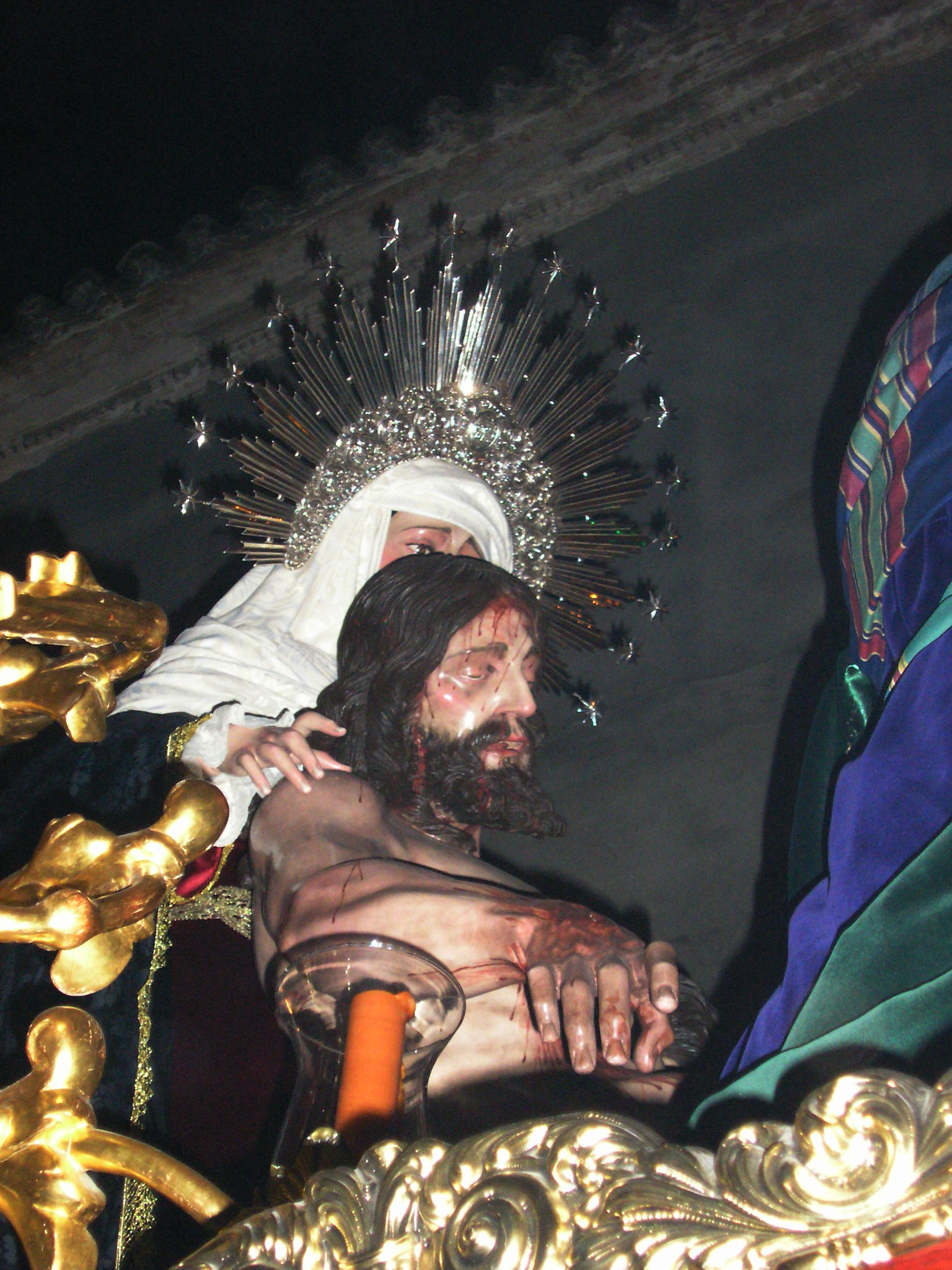 santa mortaja de Algeciras